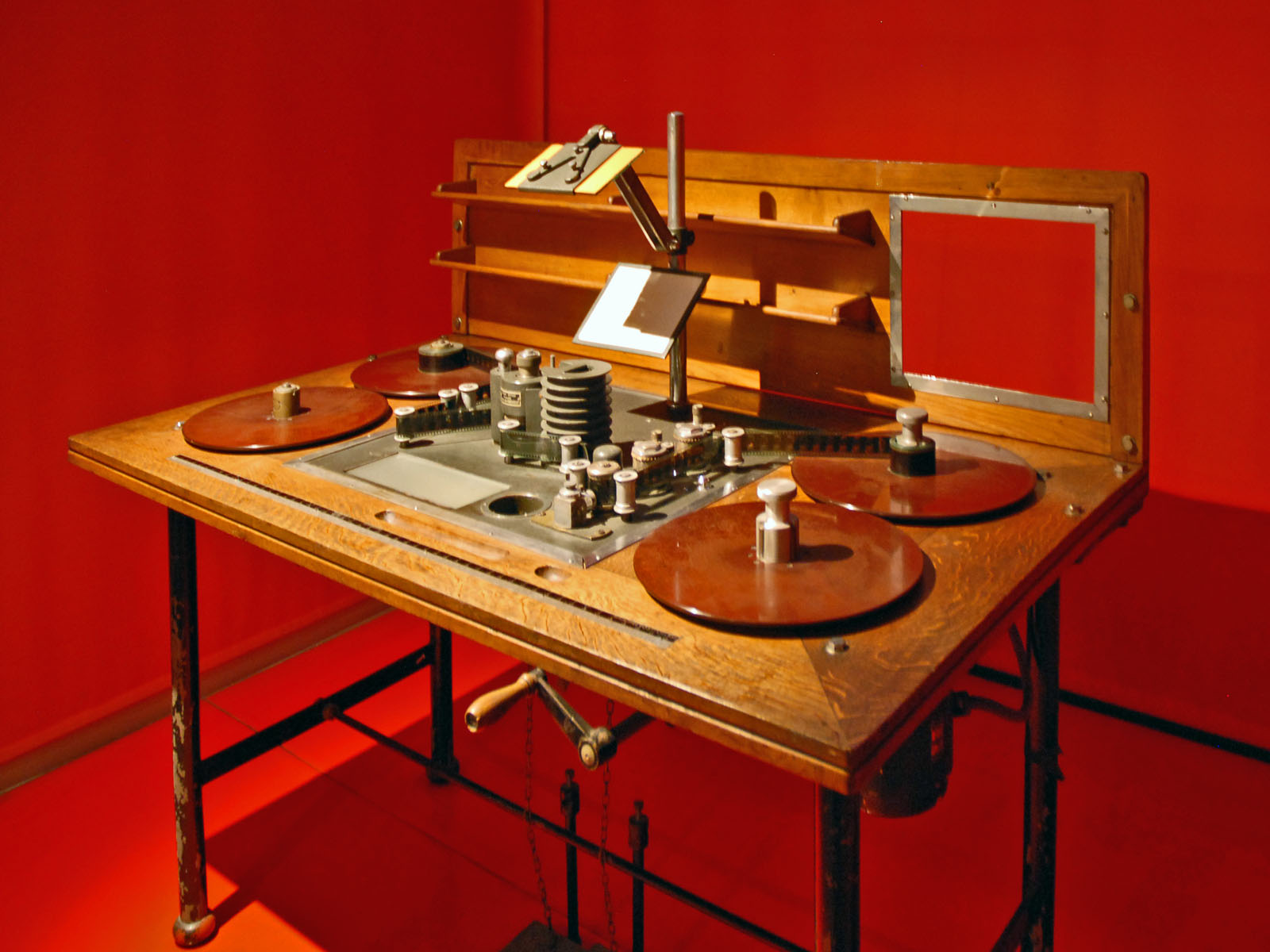 Table de montage de 1940 Inauguré en 2000, le musée du cinéma est devenu le plus fréquenté des musées de la ville de Turin, avec 2,5 millions de visiteurs. Il est le plus grand d'Europe avec ses 3 200 m2, le plus riche grâce à l'immense collection que Maria Adriana Prolo a léguée à la commune en 1991, et le plus original par sa muséographie intégrée à la môle Antonelliana.